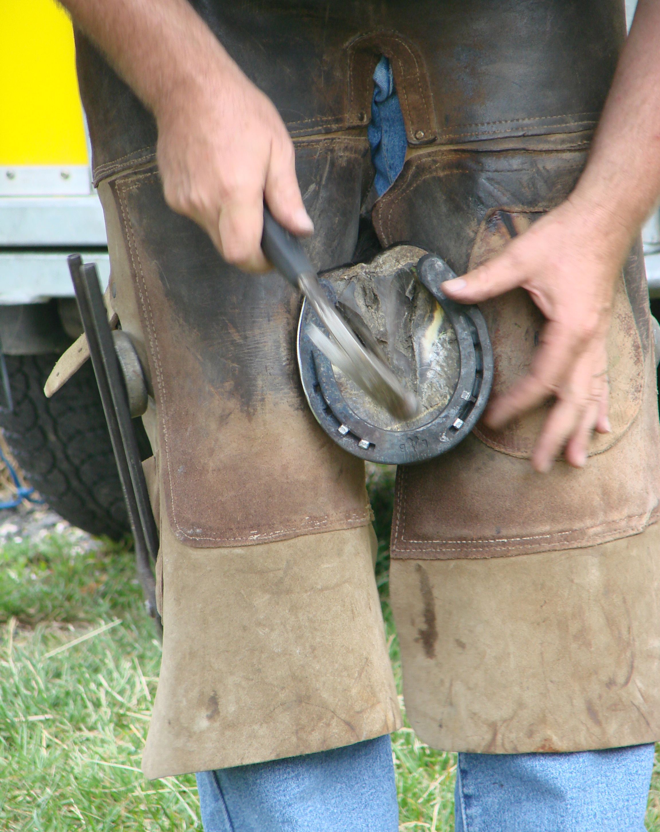 Les clous sont posés en partant du milieu et en procédant alternativement de chaque côté.